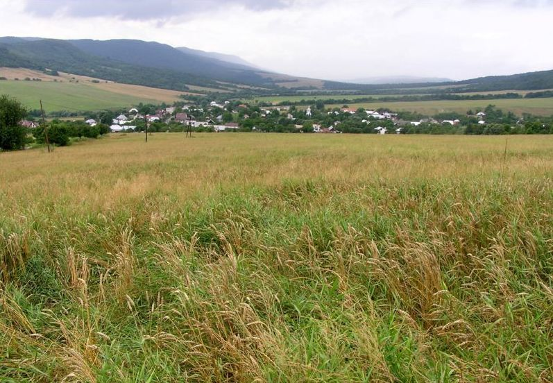 Celkový pohľad